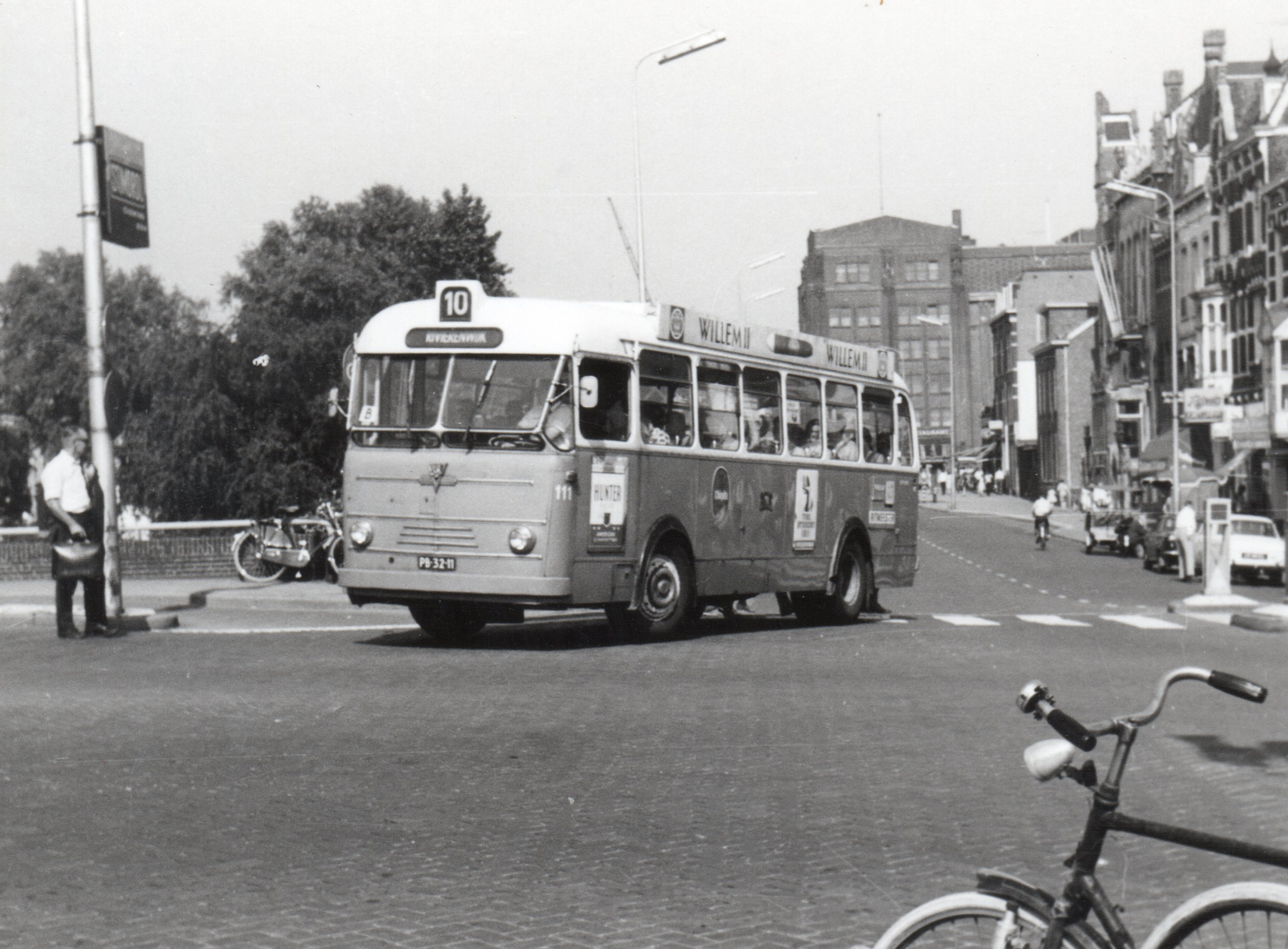 GEVU Holland Coach 111 in 1969, Utrecht